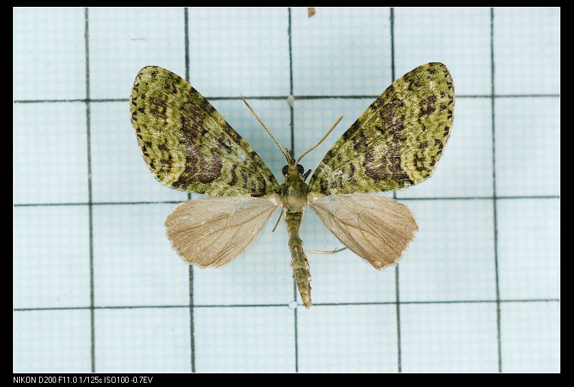 Hypocometa clauda Warren, 1896 橄欖綠波尺蛾 鞍1:P.45,Pl.11-27